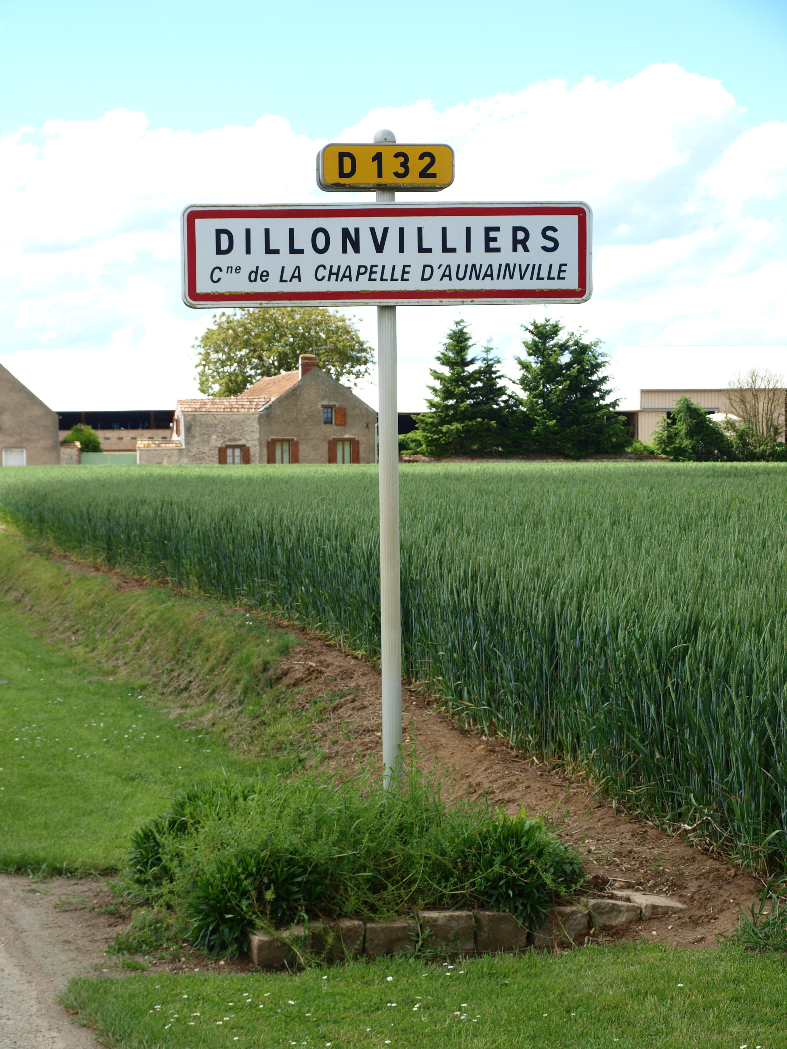 La Chapelle-d'Aunainville ; hameau de Dillonvilliers